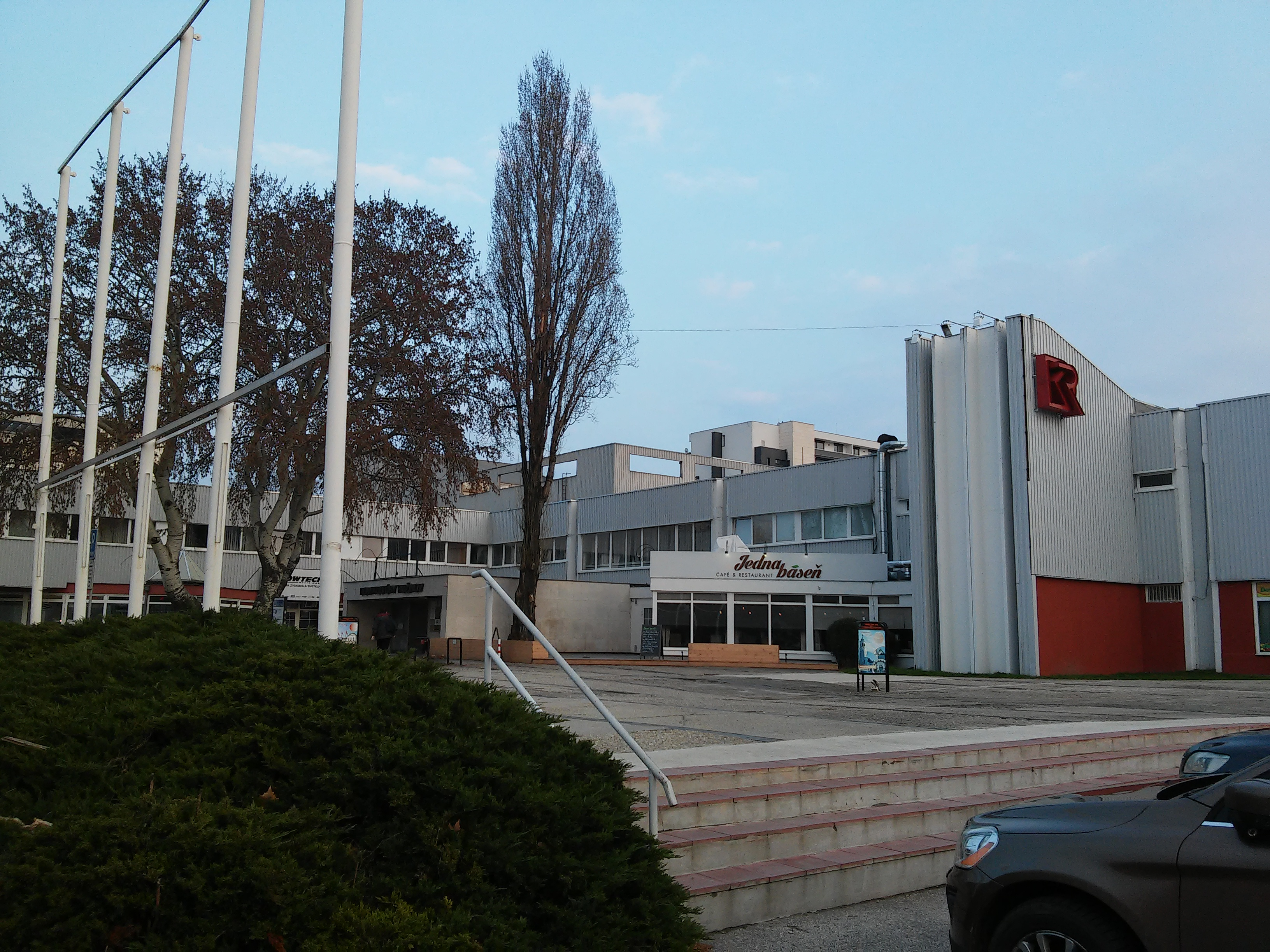 Dom kultúry Ružinov, Bratislava